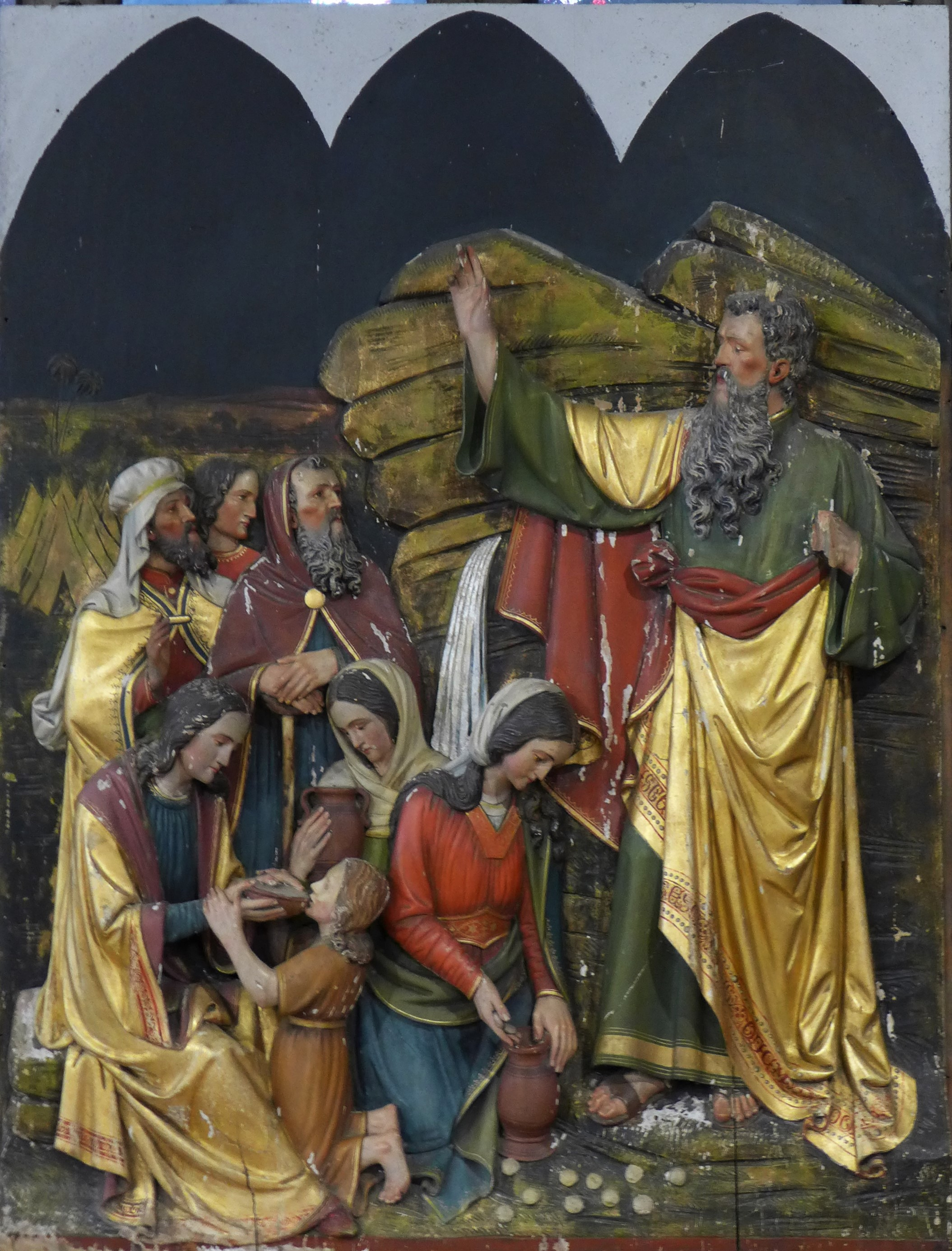 St. Josef (Saarbrücken), Hochaltarrelieftafel, Manna-Regen und Wasserwunder